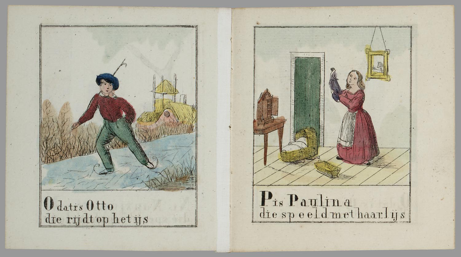 Namen-abc met handgekleurde gravures en korte rijmende teksten. A is Adolf die prentjes beziet; dan volgen Bertha, Coenraad, Dientje, Ernestus, Frederika, George, Henriette, Izaak, Johanna, Karel, Louisa, Maurits, Nansje, Otto, Paulina, Quintus, Roosje, Sander, Telma, Udolpho, Virgiena, Willem, Xantippe, Ysbrand en Zientje, elk met hun eigen bezigheden, zoals soldaatje, viool en trompet spelen, netten breien, toilet maken, dansen, vissen, fruit of vis halen, lezen, schaatsen en schijfschieten. // 4e dr 28 p : handgekleurde gravures // Datering: niet in Brinkman, uitgever werkzaam van 1843-1880; geschat // 1e dr.: 1830 (Huiskamp) Abc-boeken // Prentenboeken